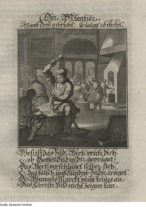 Original image description from the Deutsche Fotothek Ständebuch & Beruf & Handwerk & Münze